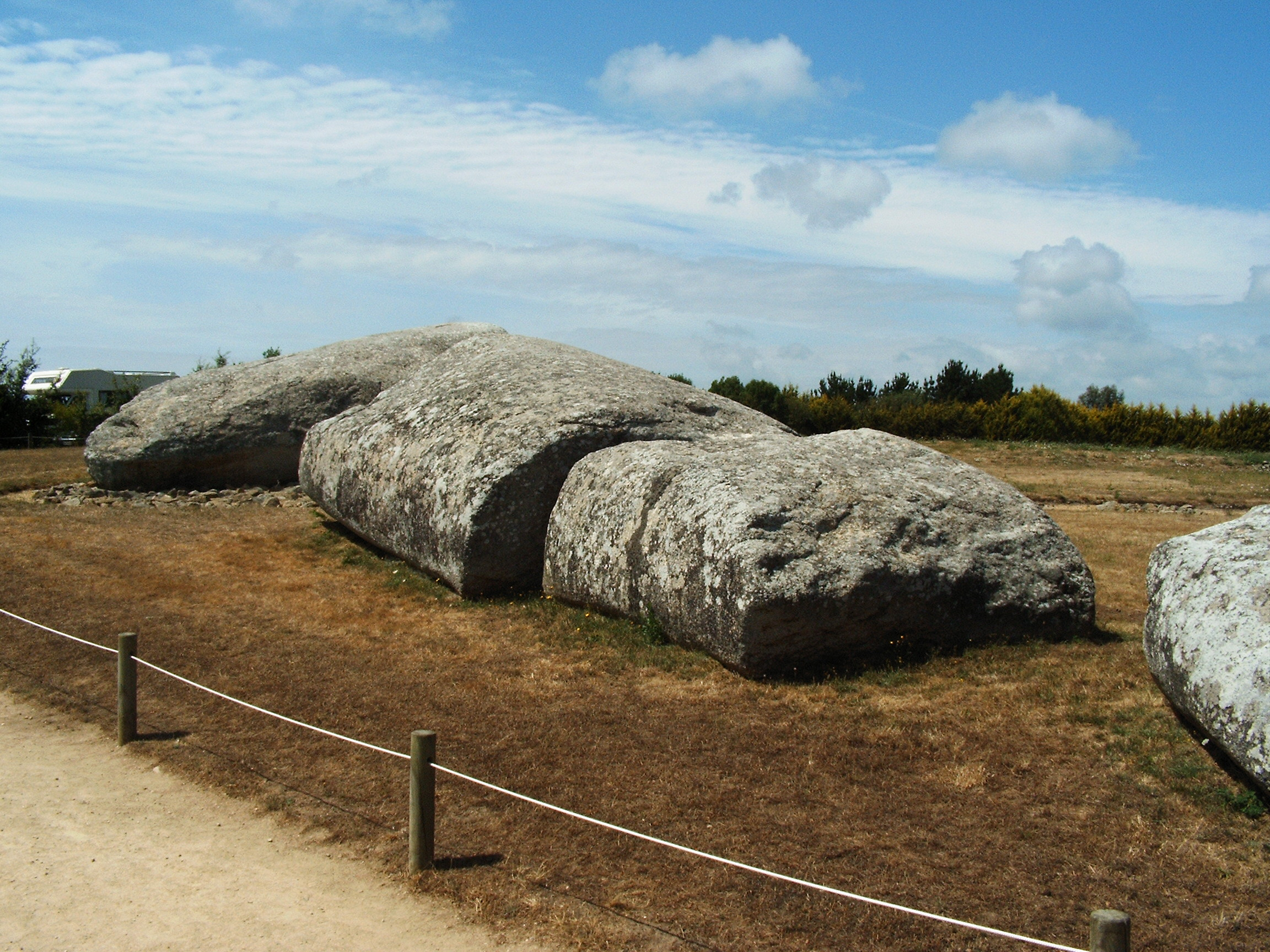 Locmariaquer - Großer Menhir